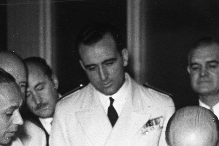 Joaquín Ruiz Giménez, ministro español de Educación